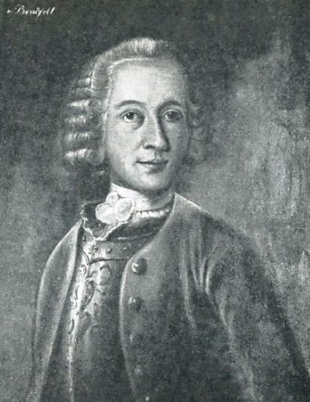 Herman Frederik Beenfeldt (1687-1761), Danish general, estate owner, and nobleman